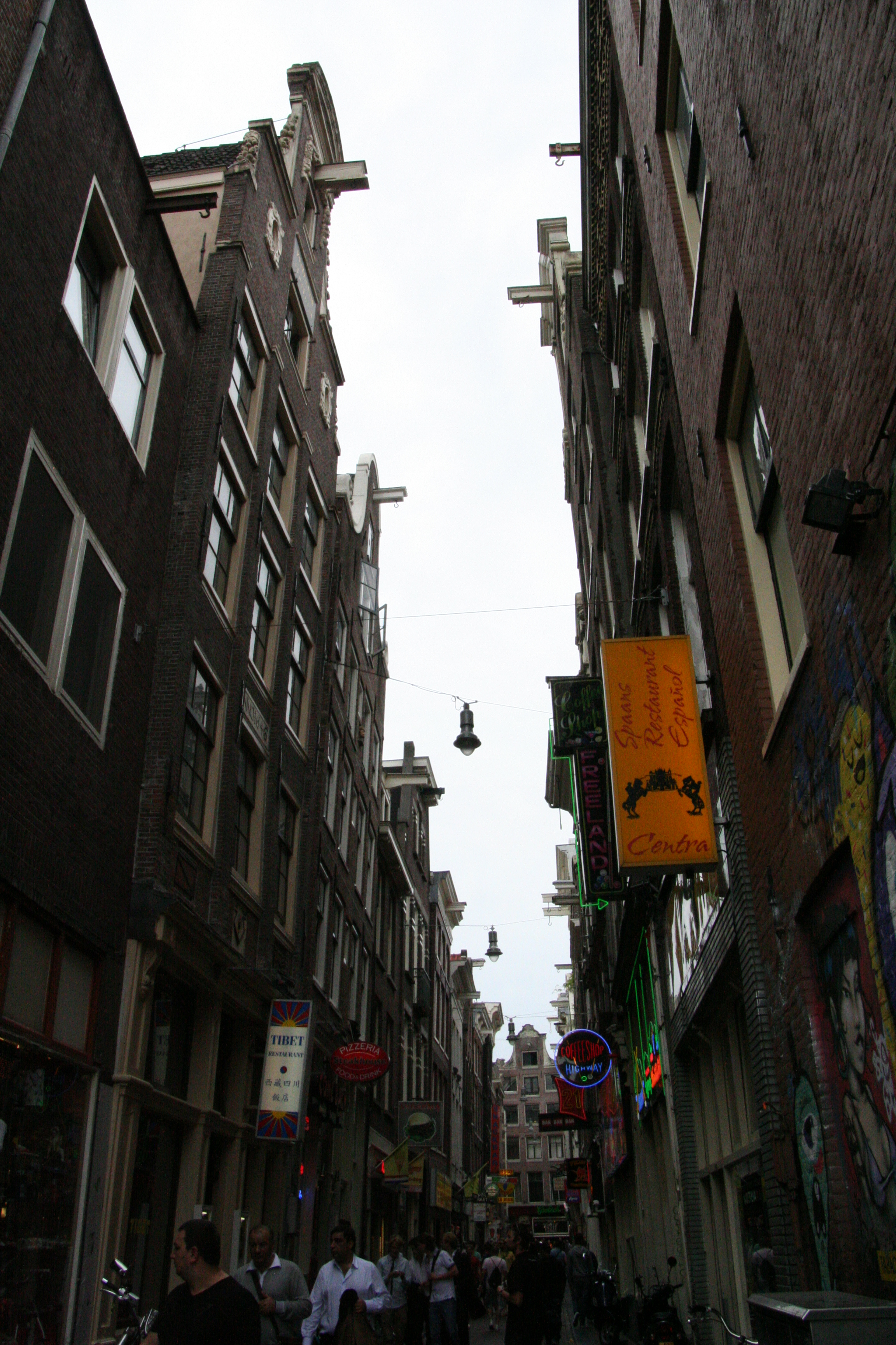 Onder andere Lange Niezel 24 (Restaurant Tibet)